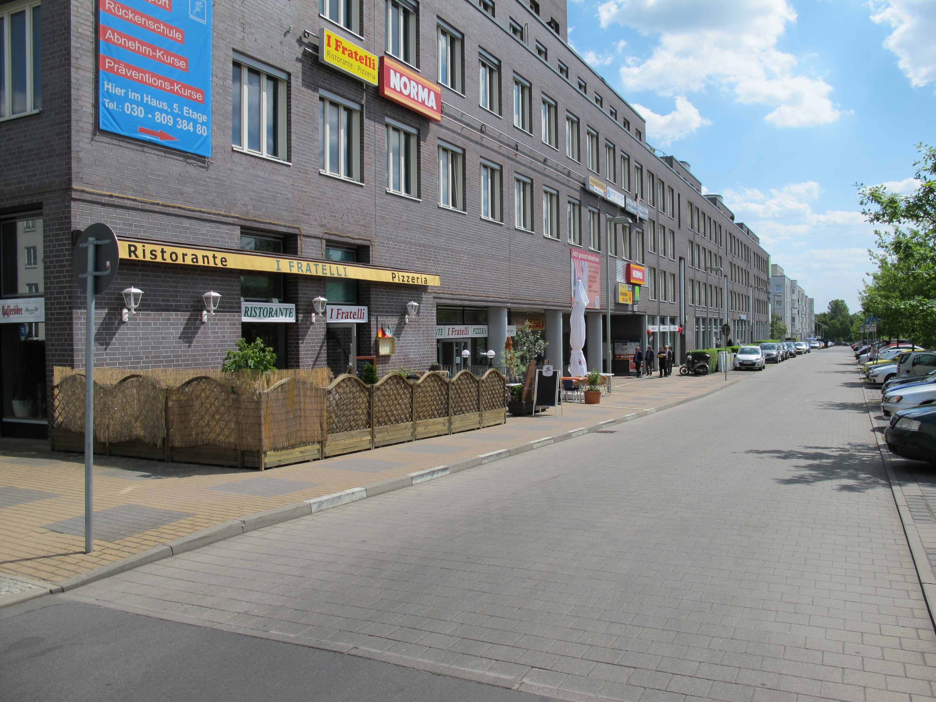 Market Hall Marzahn